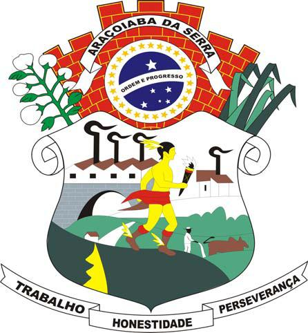 Brasão do município de Araçoiaba da Serra, estado de São Paulo, Brasil